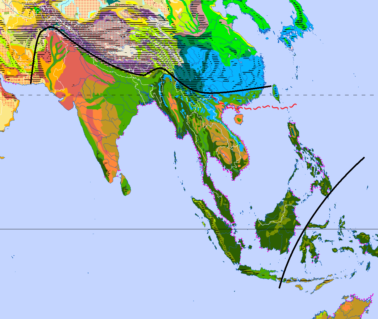 Eisschilde u. Gletscher Immergrüner borealer Nadelwald Winterkalte Halbwüsten Trockensavannen Kältewüste Gebirgs-Nadelwälder Winterkalte Wüsten Dornstrauch- u. Kakteensavannen Flechten- u. Moostundra Gemäßigte Küsten-Regenwälder Hartlaubvegetation Tropische Trockenwälder Zwergstrauch- u. Wiesentundra Laub- u. Nadelmischwälder Heiße Halbwüsten Regengrüne Feuchtsavannen Bergtundra, alpine Matten u. Heiden Gemäßigte Laub- u. Auenwälder Heiße Wüsten Laubholz Waldtundra u. boreale Auen Gemischte Waldsteppen Hochlandsteppen u. -wüsten Nadelholz Waldtundra Grassteppen u. Salzwiesen Subtropische Trockenwälder Tropische Gebirgsregenwälder Sommergrüner borealer Nadelwald Strauch- u. Trockensteppen Subtropische Feuchtwälder Riedsümpfe u. flutende Wasserpflanzen ≡ = Gebirgszüge ::: = vegetationslose Wüstenregionen ⋮¤⋮ = Oasenvegetation (z.T. mit Begrenzung) ••• = Mangrovenküsten